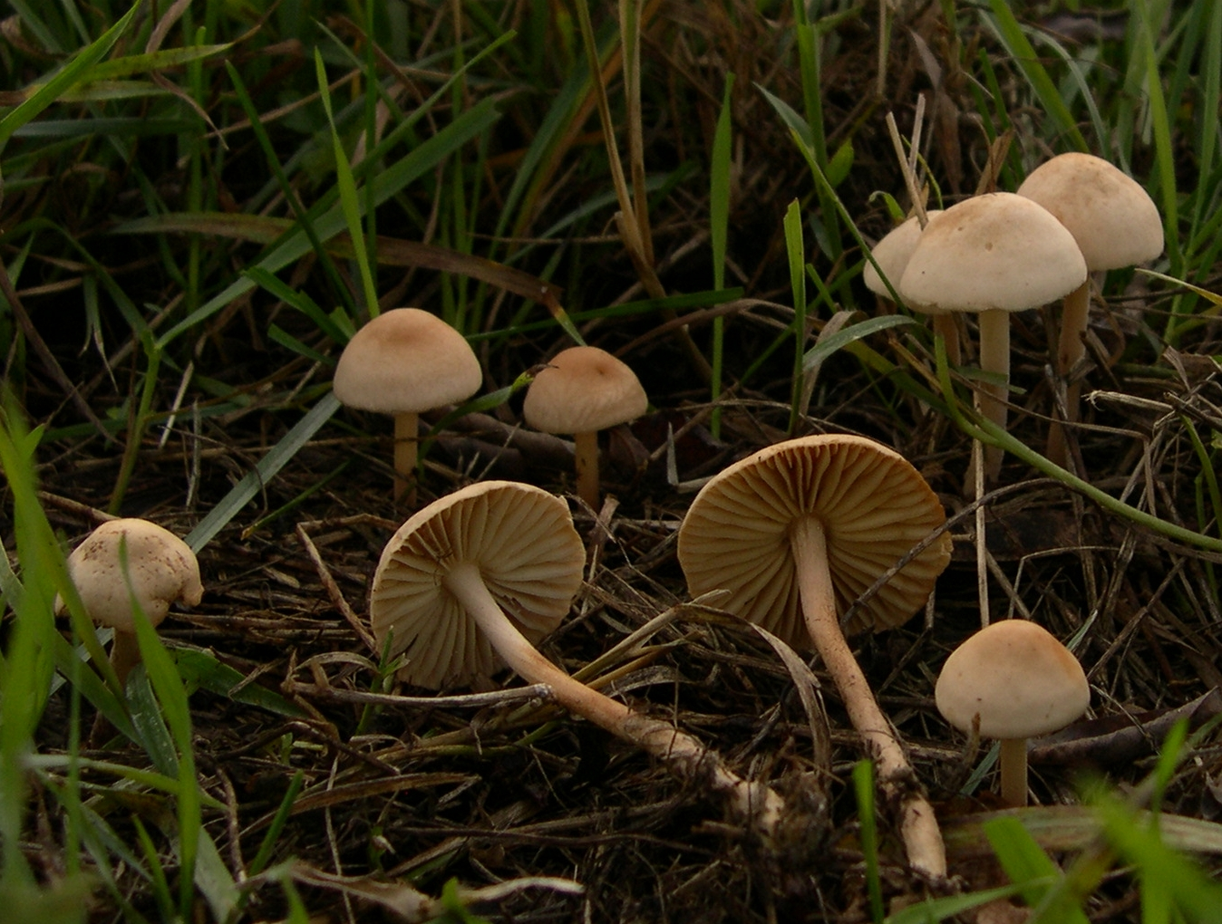 Marasmius oreades